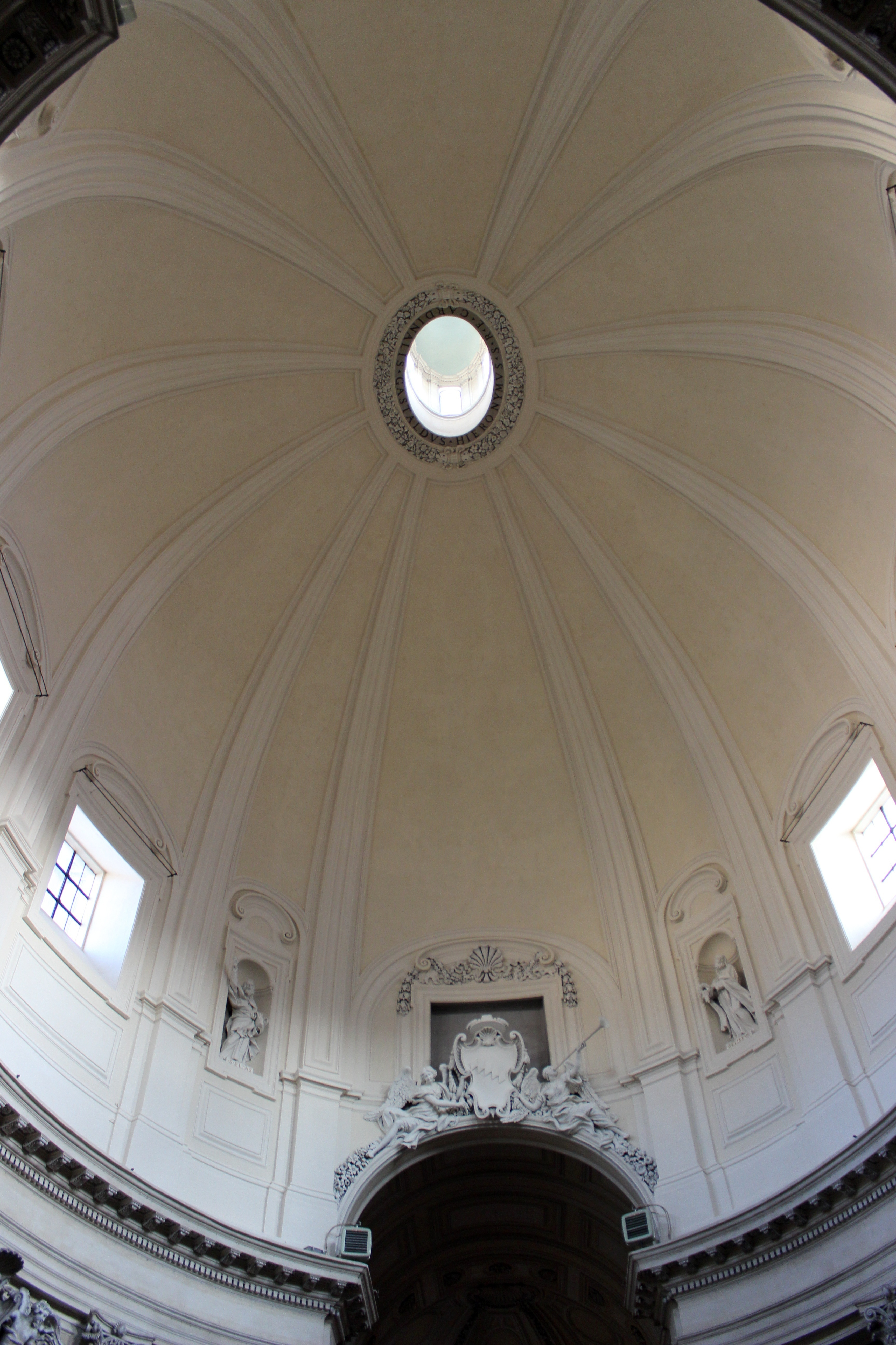 Roma. Santa Maria in Montesanto. Interior.